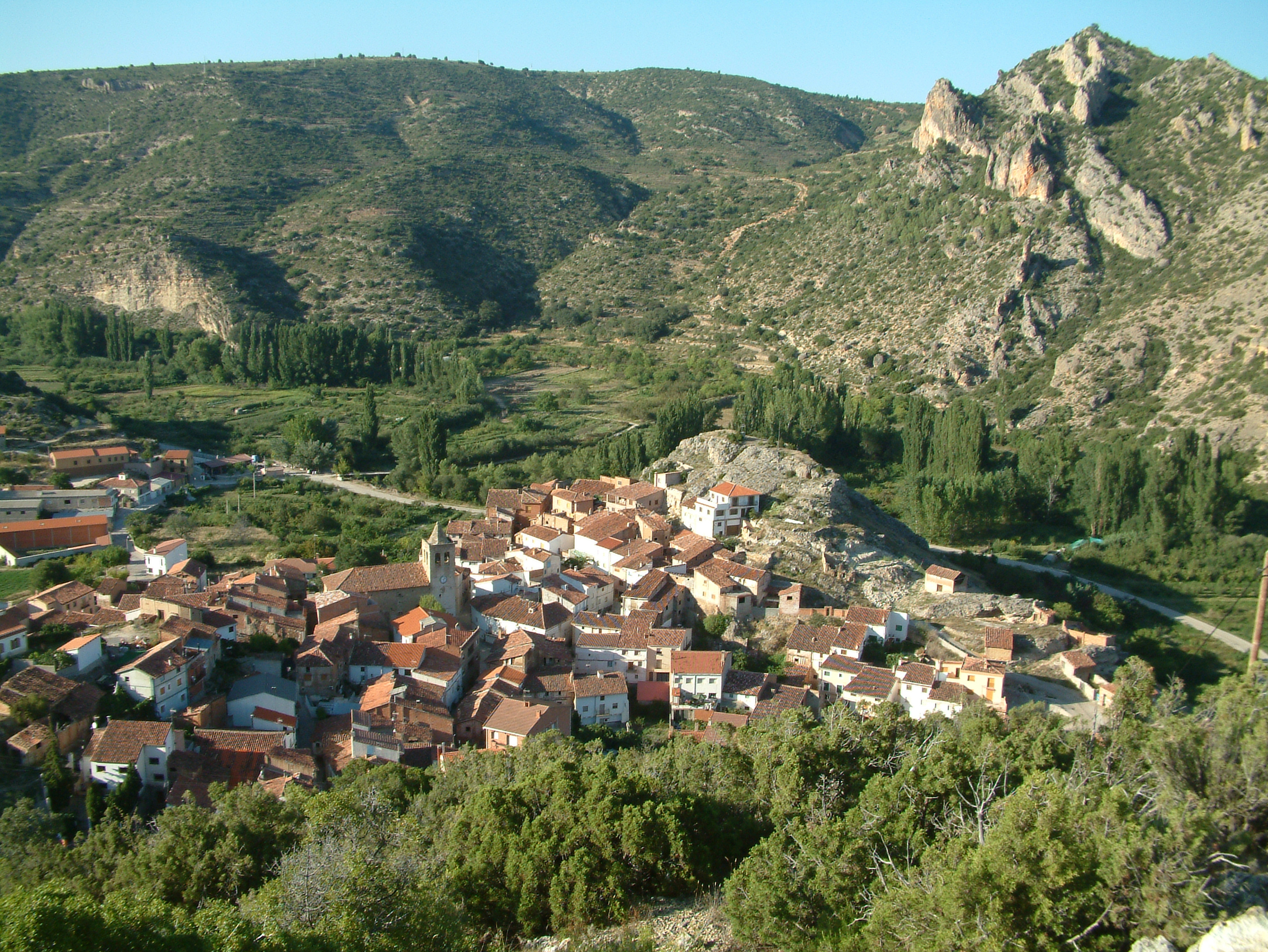 Vista de la Villa de "El Cuervo", en la provincia de "Teruel", su valle regado por el "rio Ebron" y al fondo la "Peña de los Picarzos"